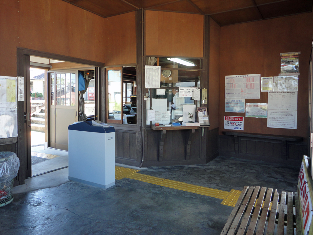 富山地方鉄道本線寺田駅 駅舎内